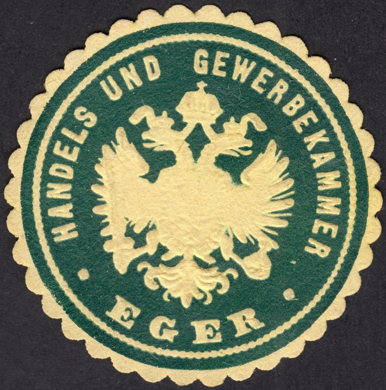 Siegelmarkte der Handels-_und_Gewerbekammer_Eger zwischen 1855 und 1918